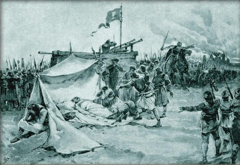 Adolf Liebscher - Smrt Jana Žižky z Trocnova před Přibyslaví dne 11. října r. 1424